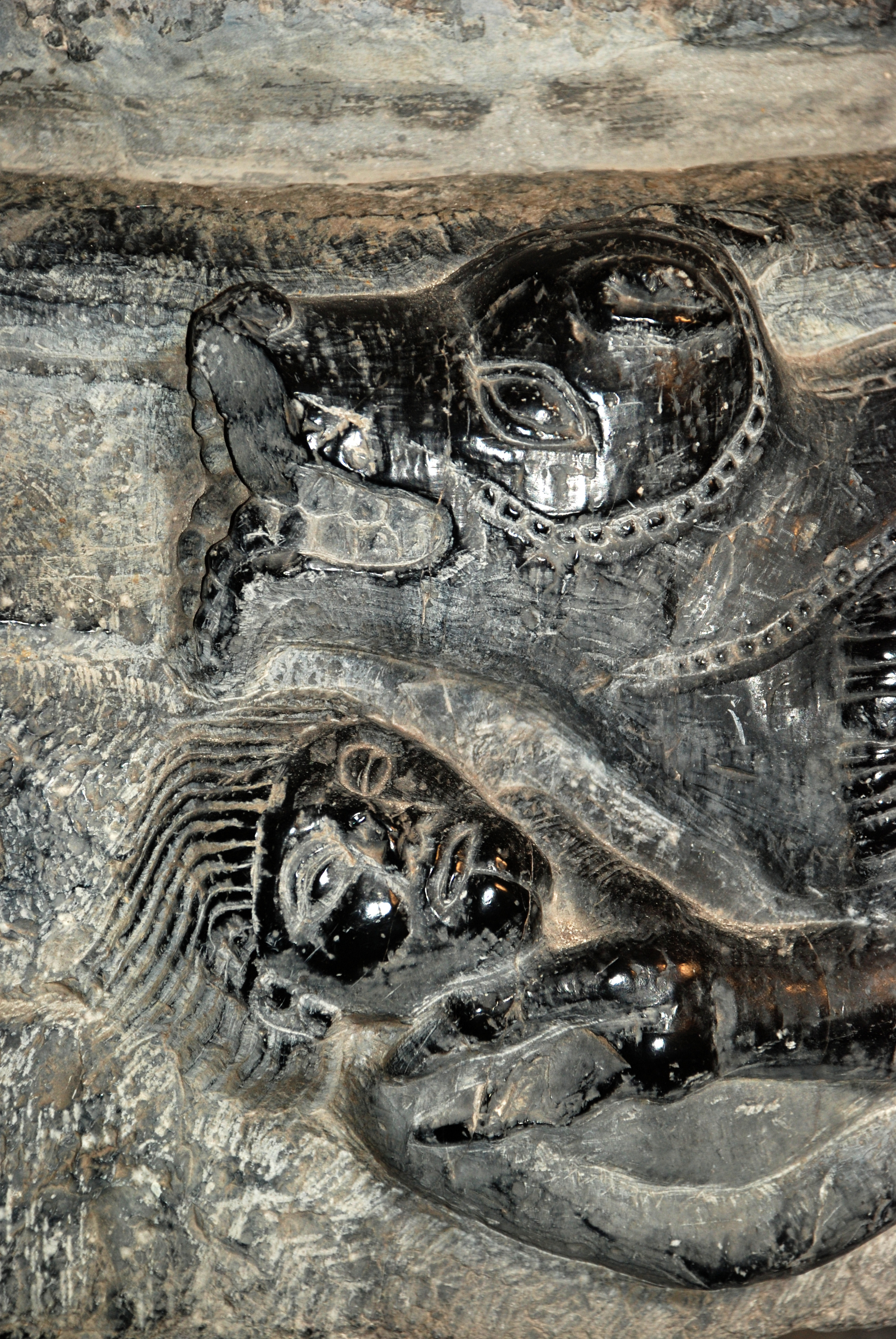 Belgique - Province de Namur - Fonts baptismaux de Furnaux